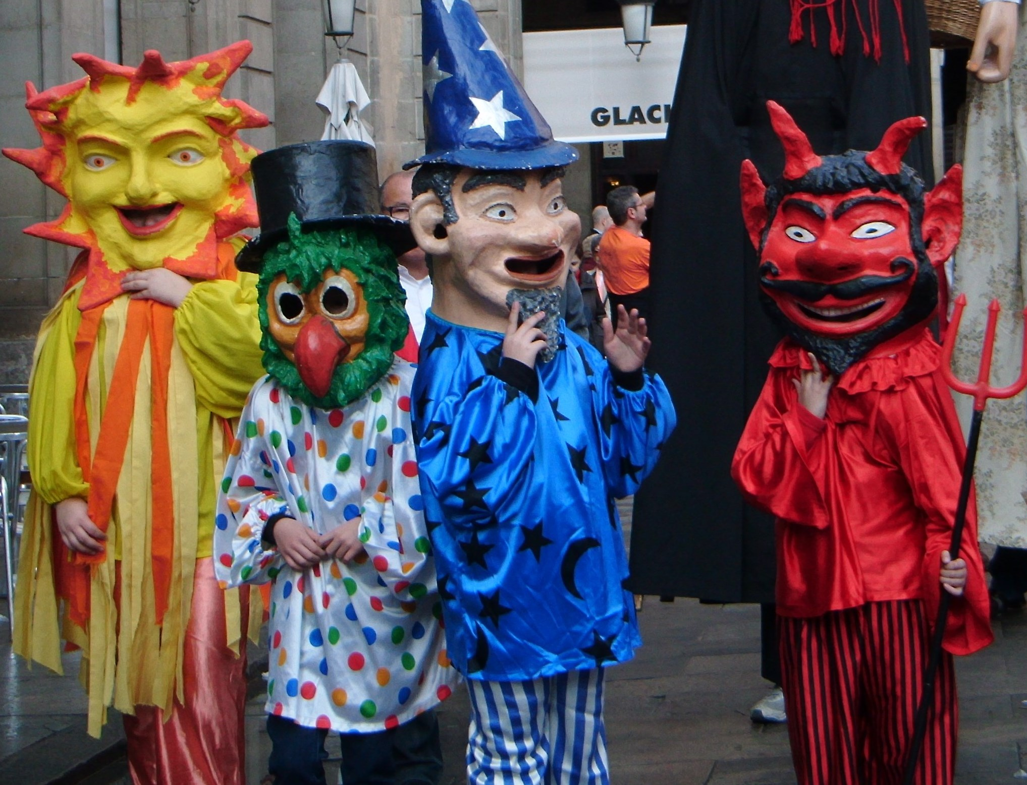 Capgrossos creats per l'escola Xerrac del Guinardó